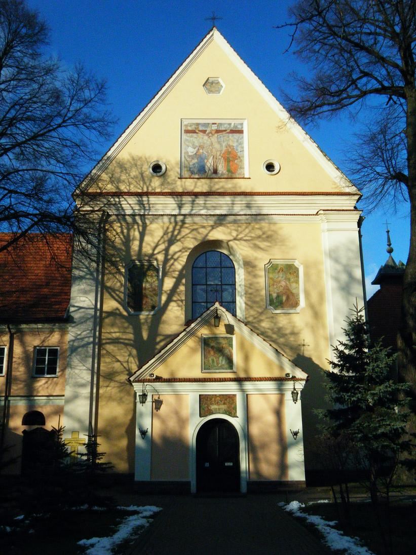 Kościół_Świętej_Trójcy_Jarosław